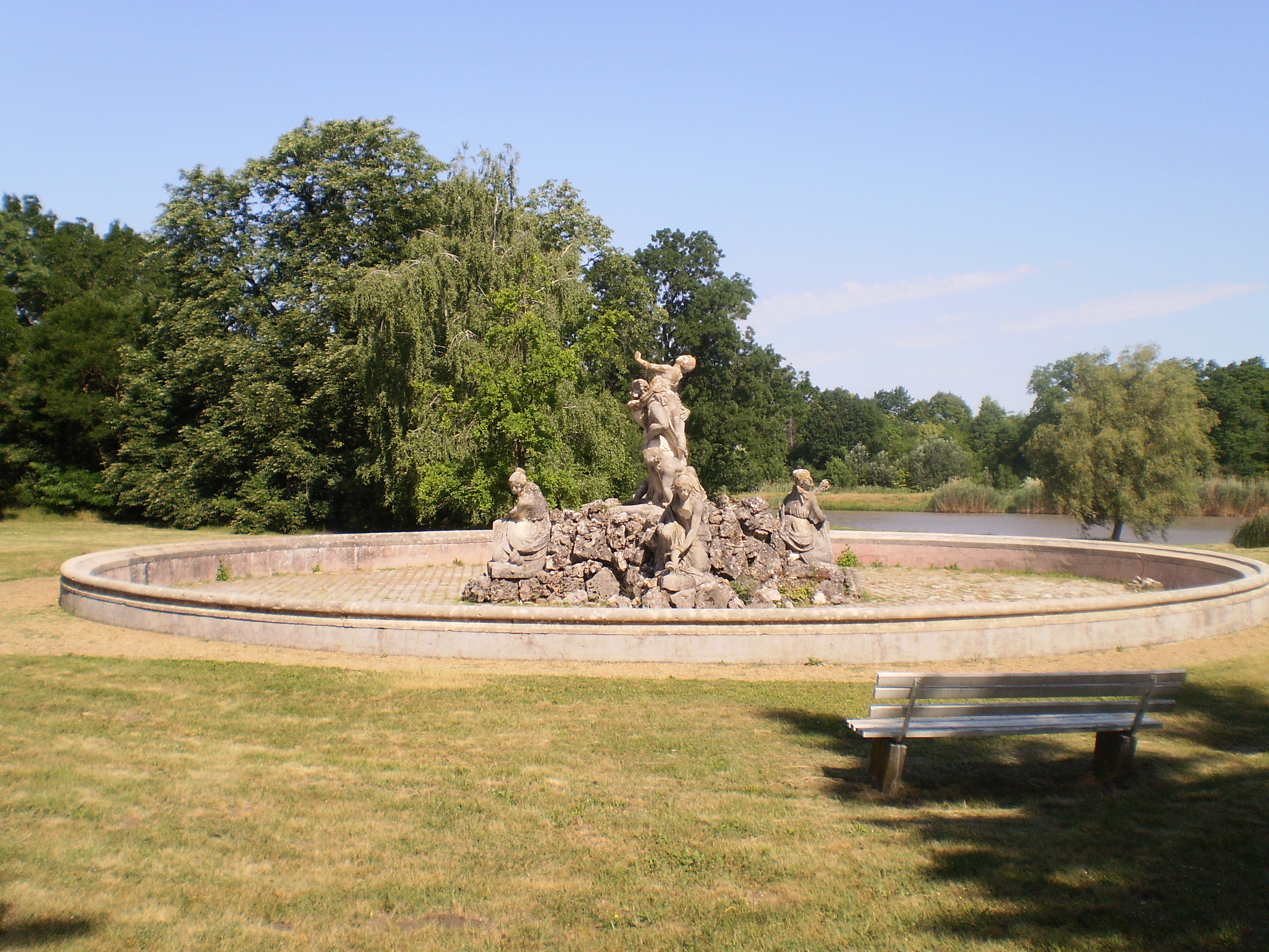 A "Szabin nők elrablása" szökőkút Nagymágocson, a Károlyi-kastélyban.